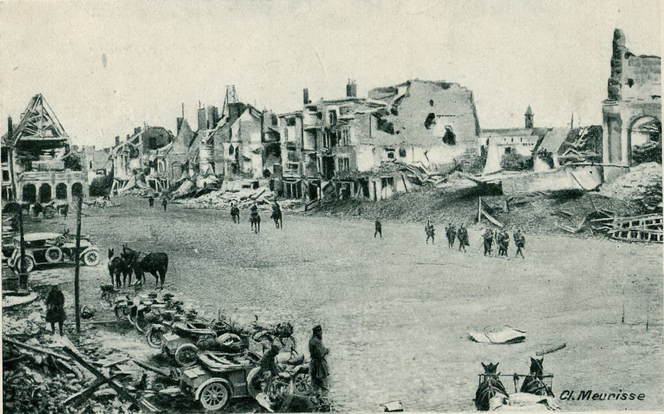 Carte postale éditée par l'agenda PLM de 1919 Péronne (Somme) : La place de la Cathédrale (après les destructions le la Première guerre mondiale)